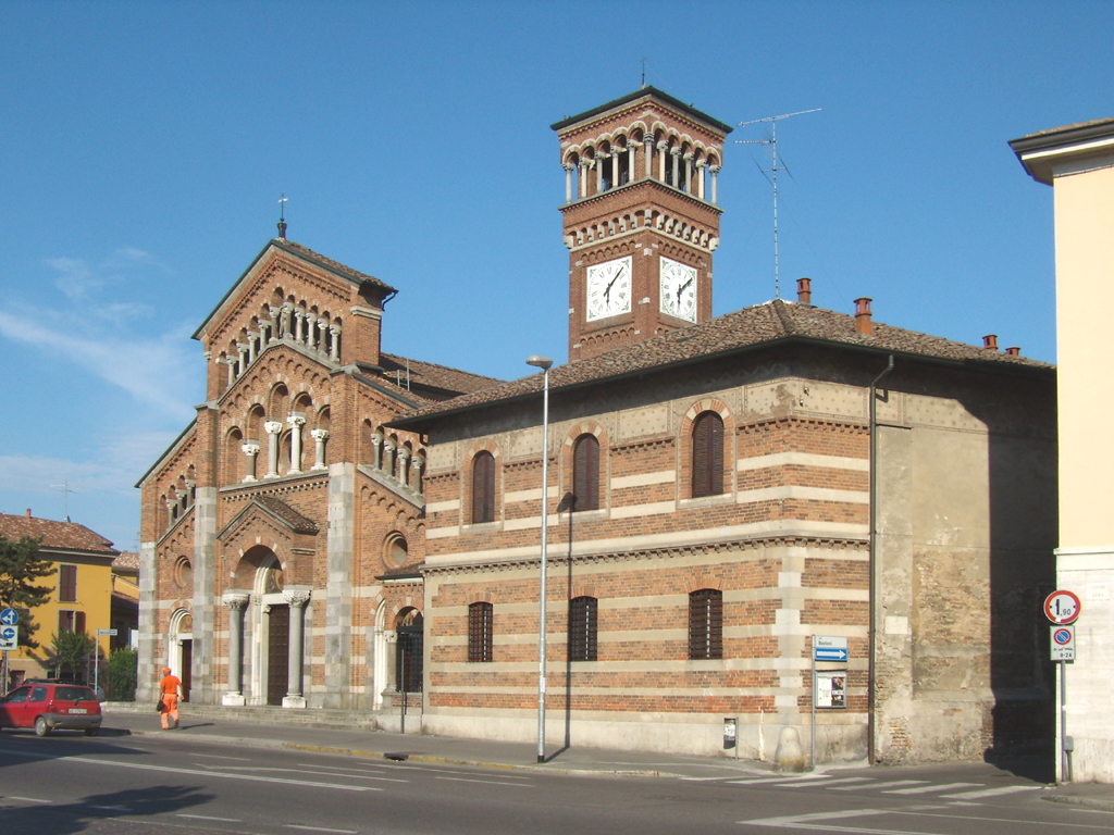 La chiesa di San Rocco a Lodi